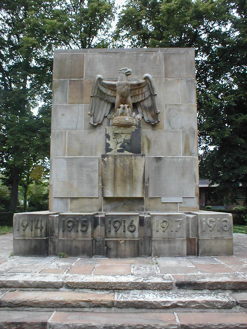 war memorial Drensteinfurt, Germany